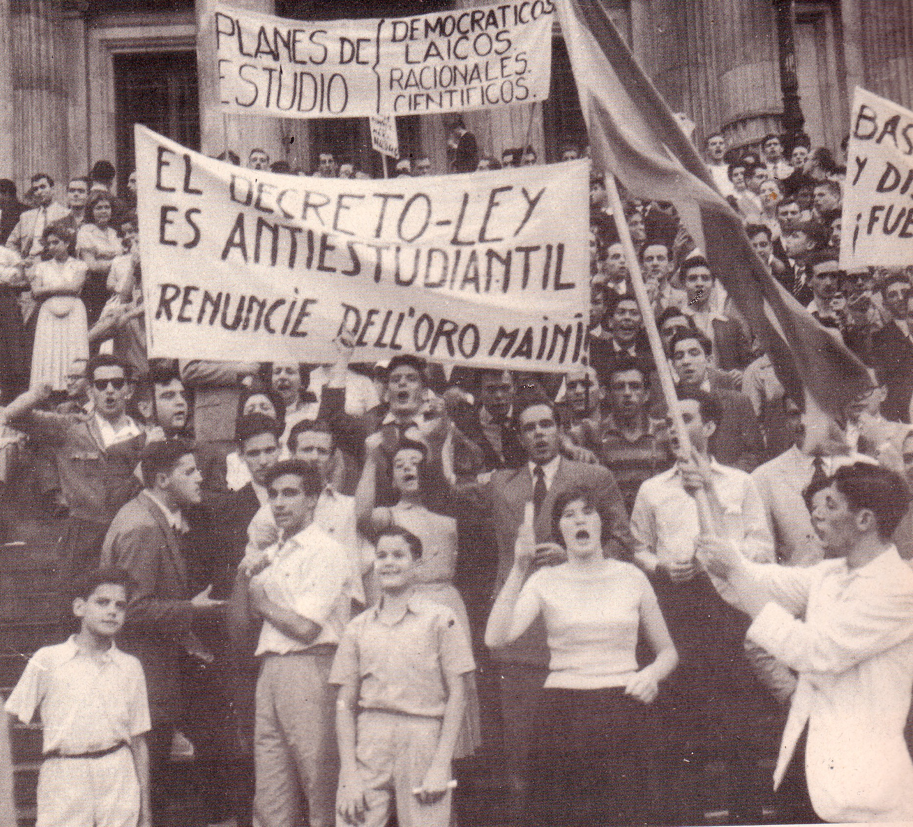 Laica o Libre. Movilización obrero-estudiantil. Buenos Aires 1959.